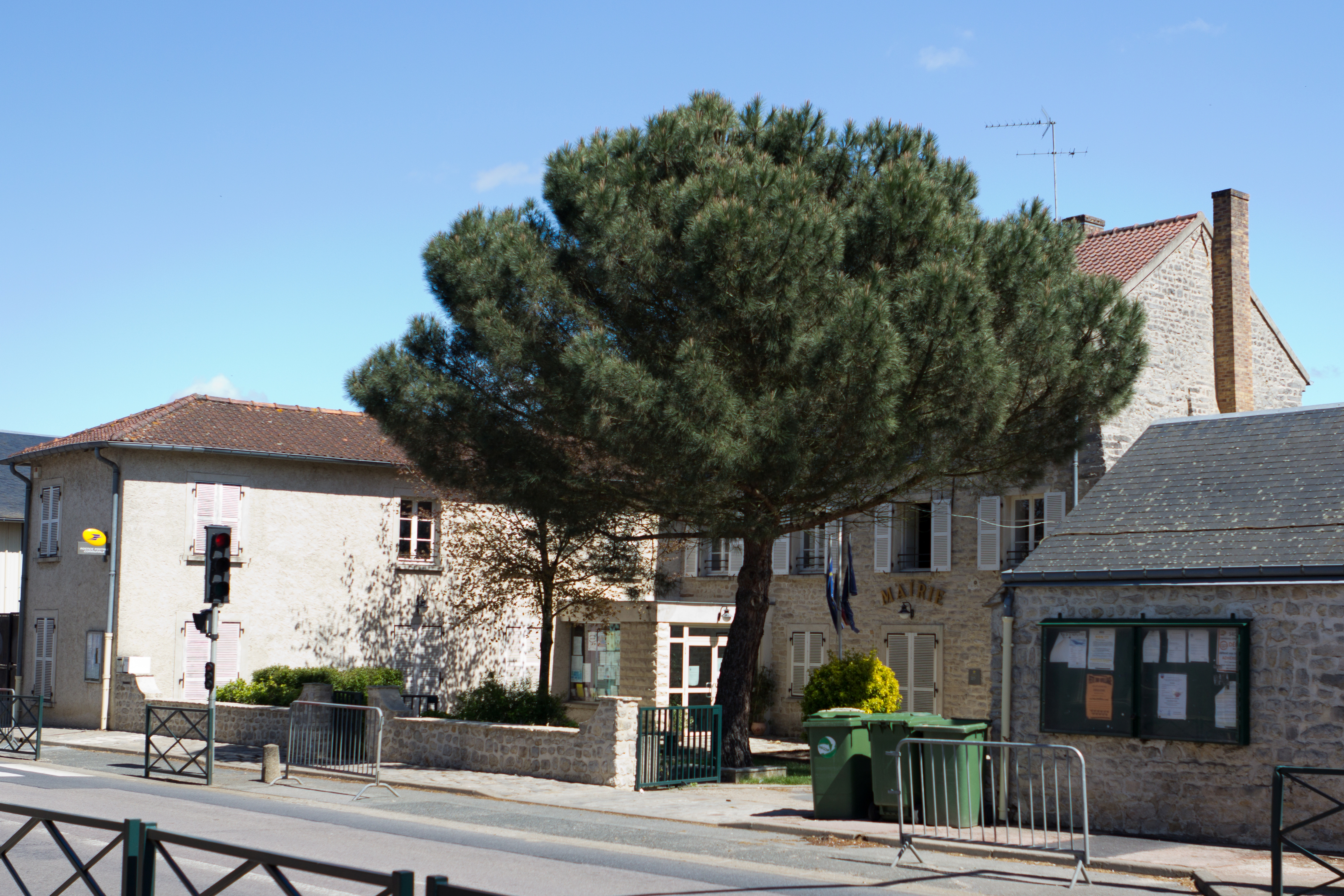 Mairie de Boissy-le-Cutté, Boissy-le-Cutté, département de l'Essonne, France.